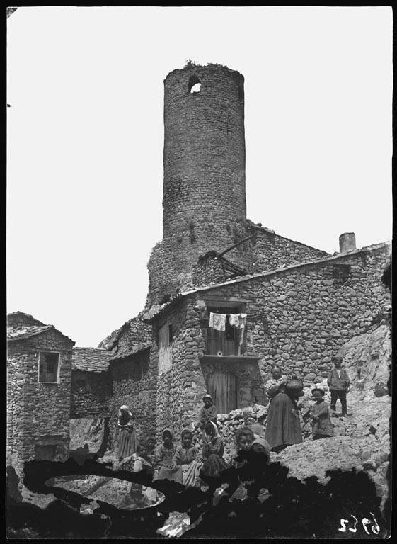 Imatge